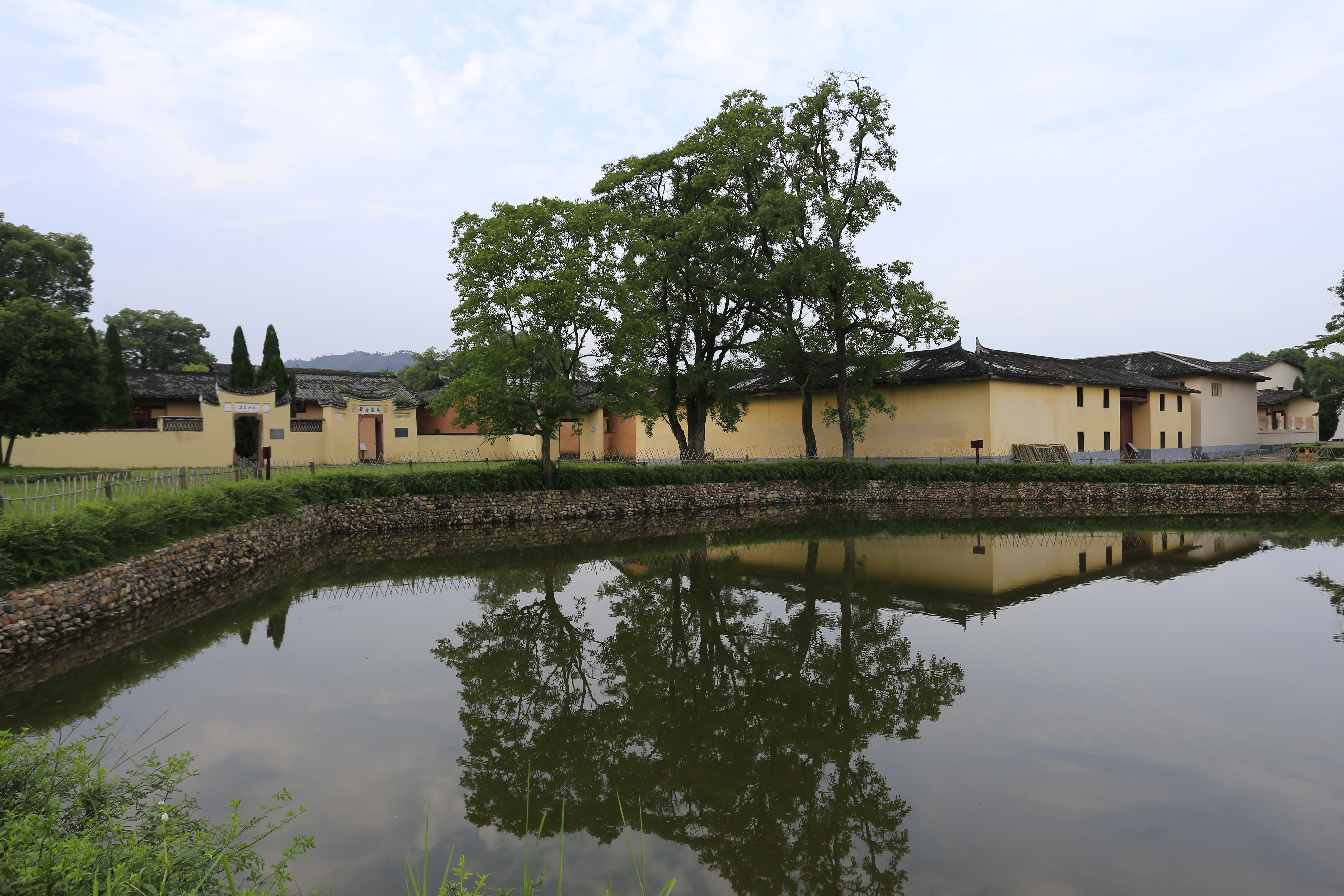 瑞金沙洲坝革命旧址—— 中华苏维埃共和国中央审计委员会旧址、内务人民委员部旧址、中央粮食人民委员部旧址